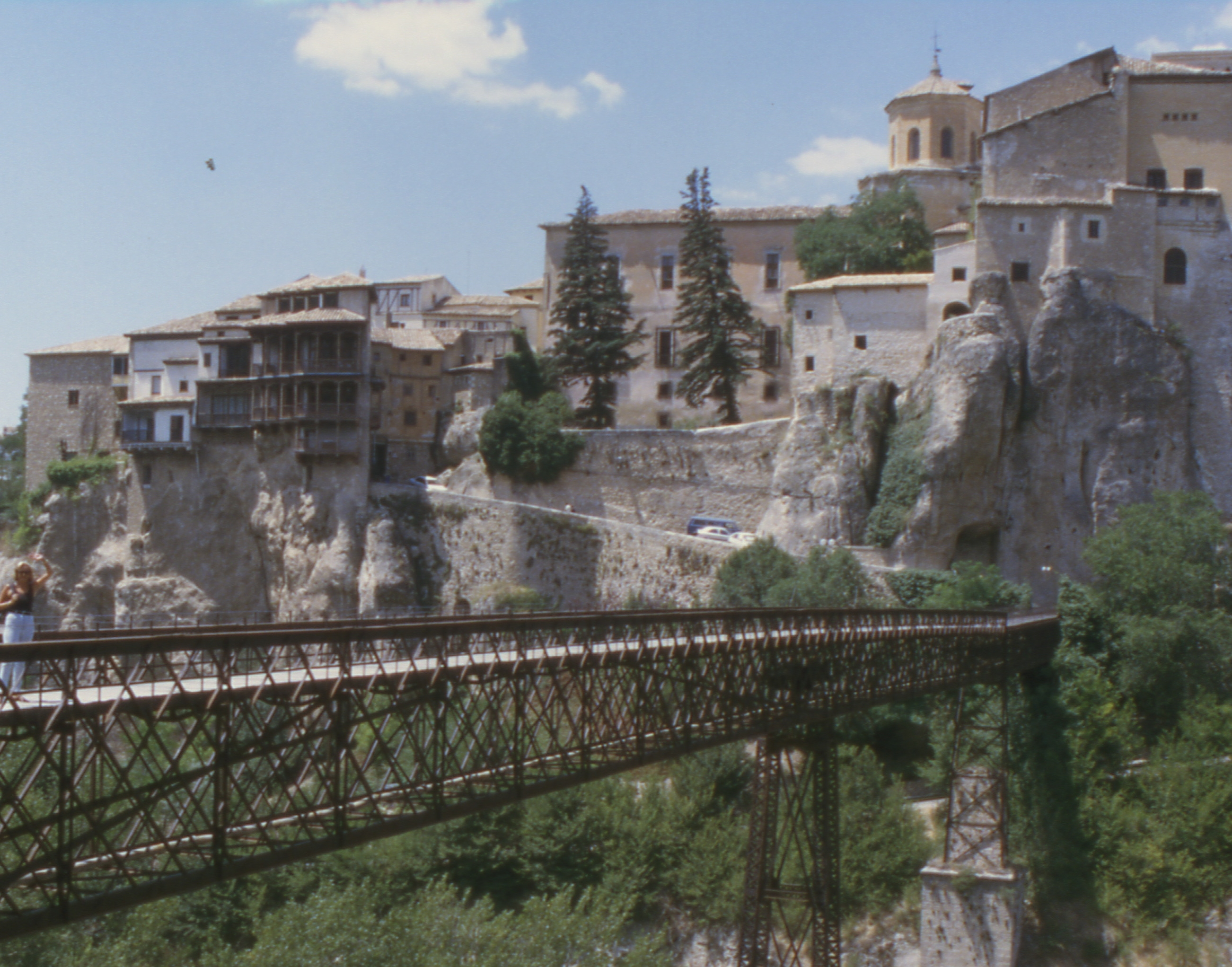 Cuenca